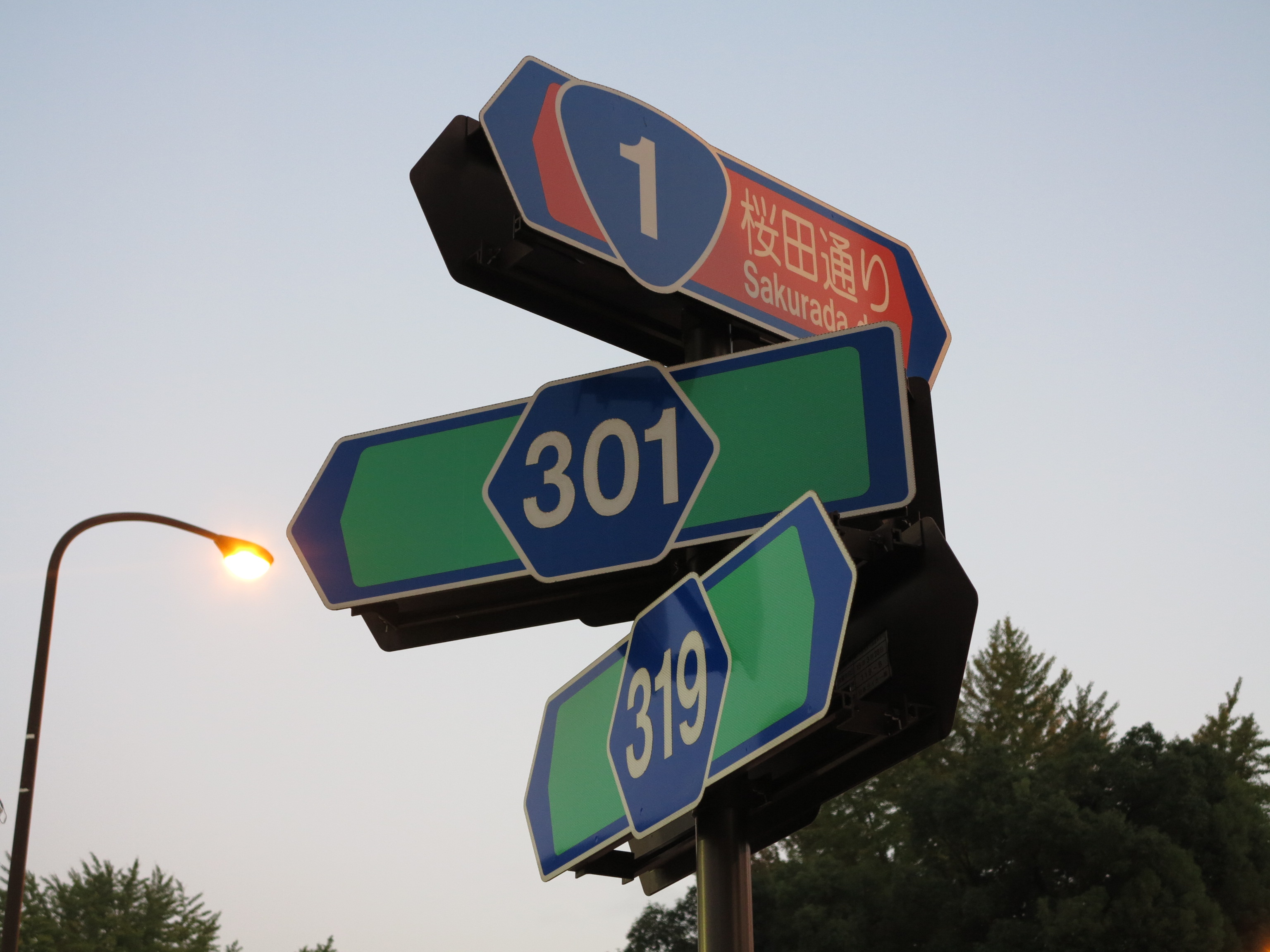 赤羽橋交差点の道路名称標識